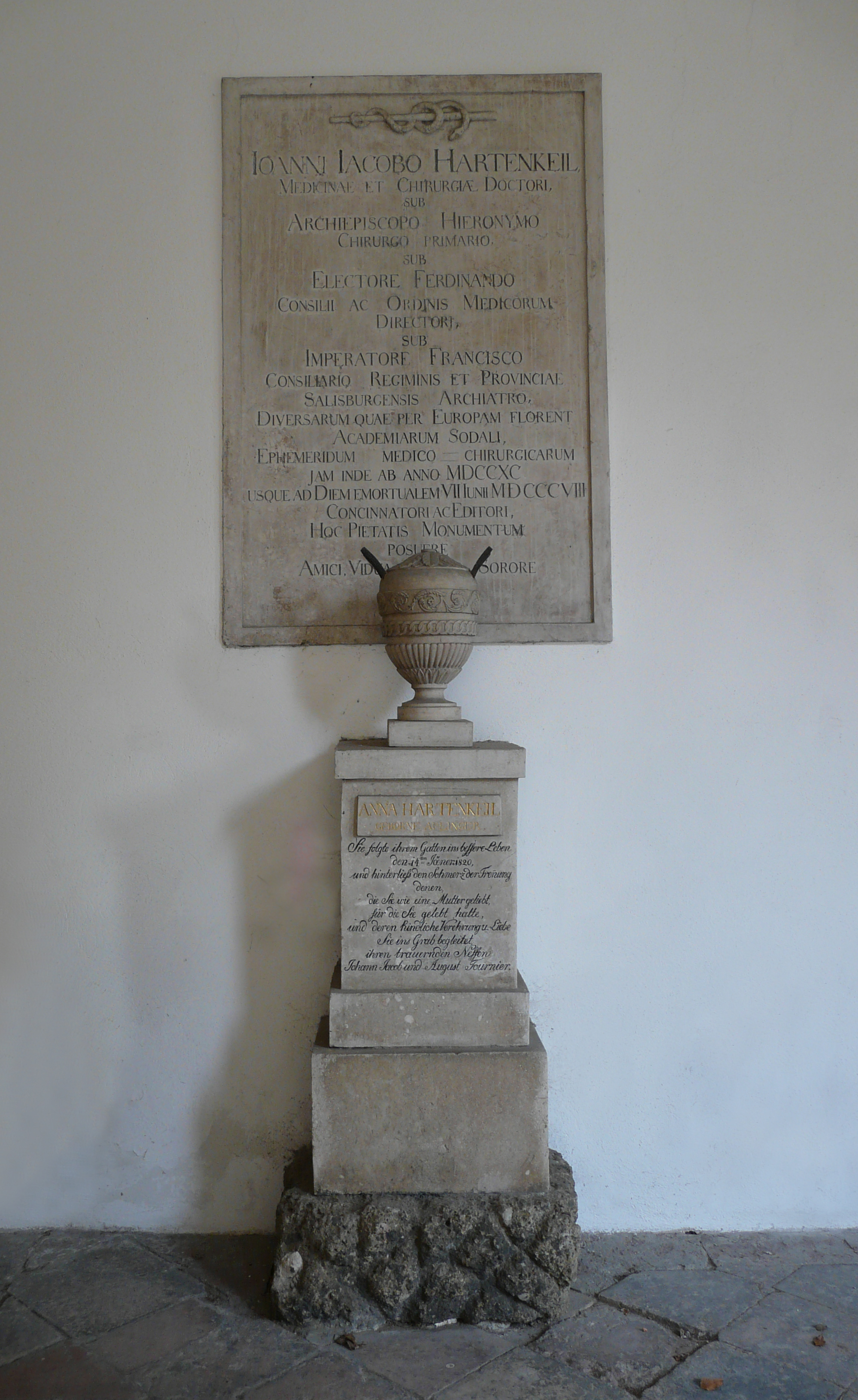 Grabmal des Arztes Dr. Johann Jakob Hartenkeil auf dem St.-Sebastians-Friedhof in Salzburg